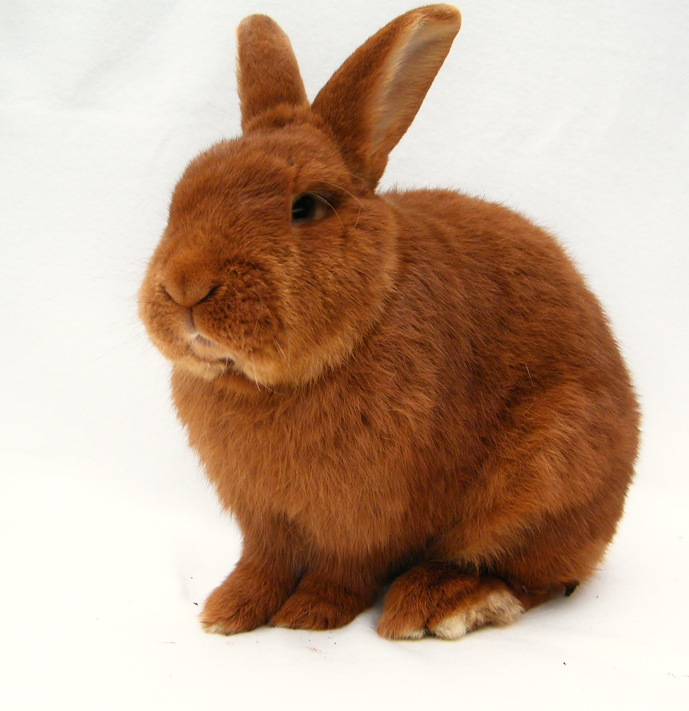 Konijn Fire